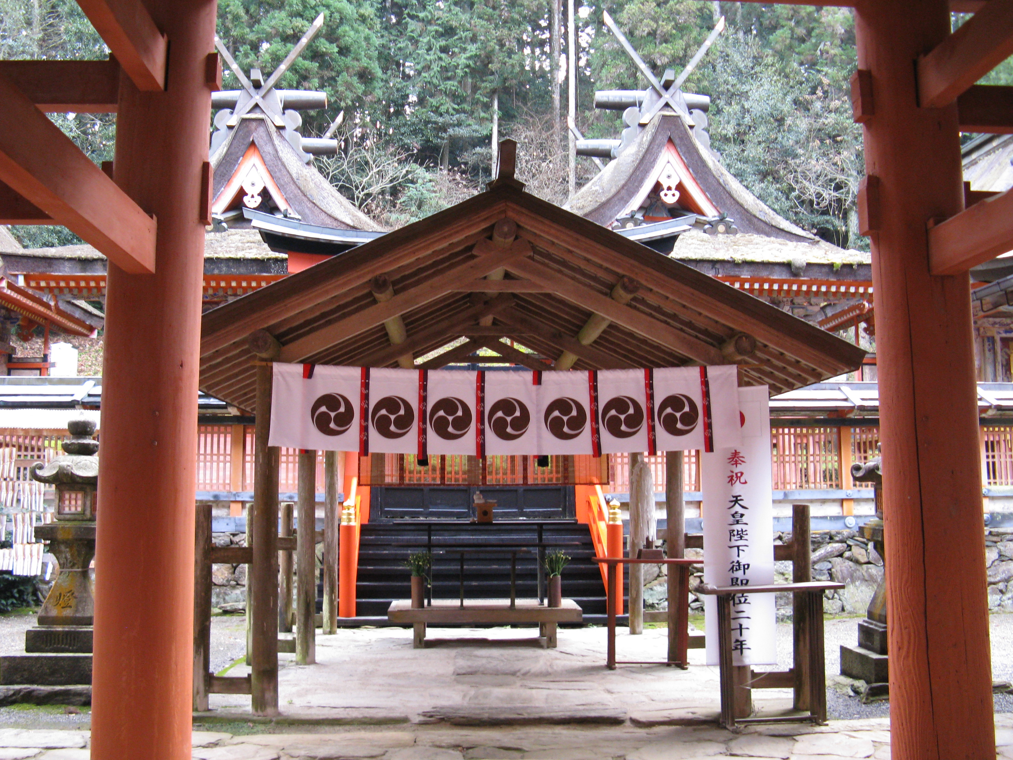 丹生都比売神社 楼門からの第二～第三本殿